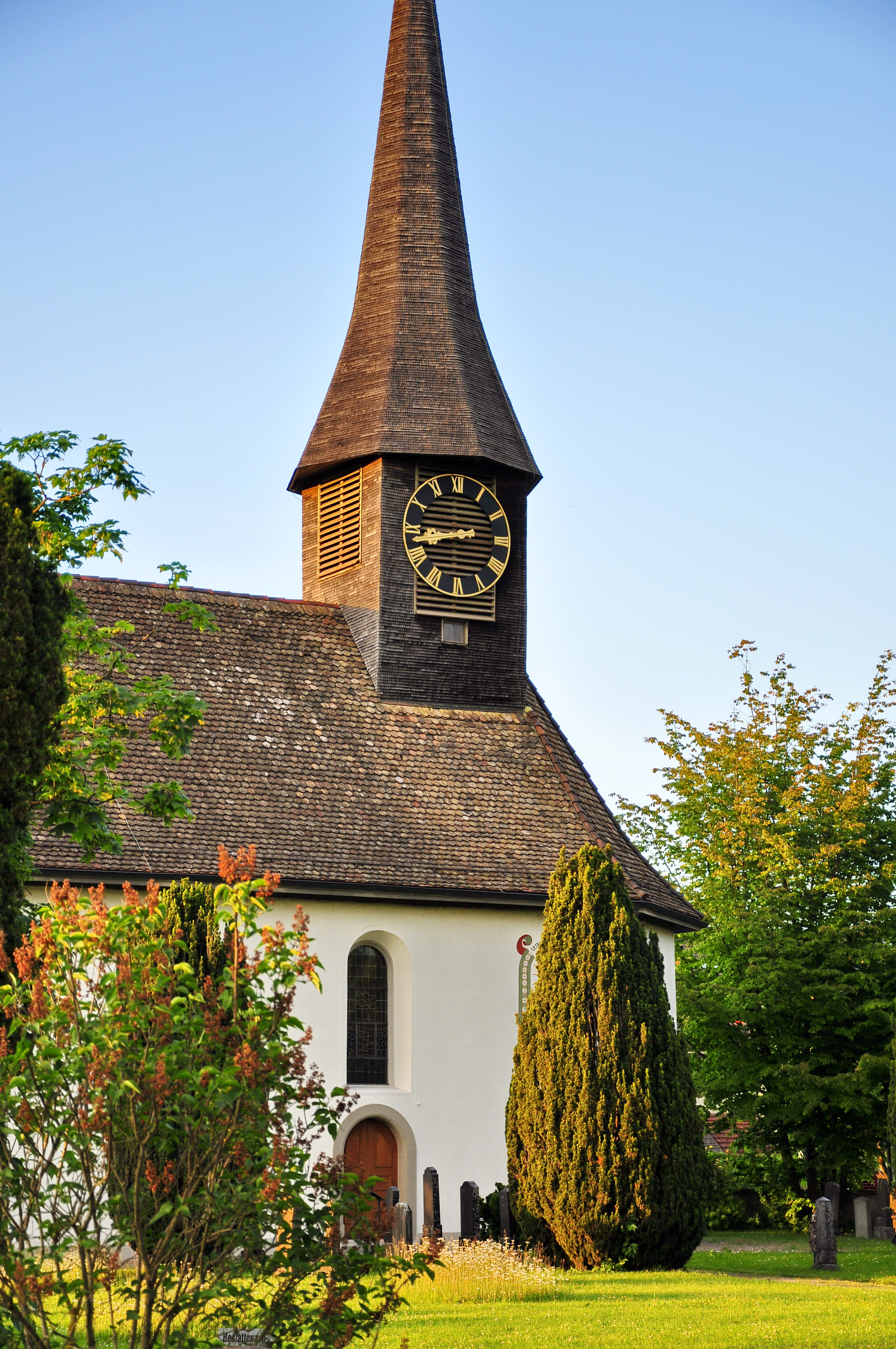 Reformierte Kirche in Zürich-Unteraffoltern (Switzerland)